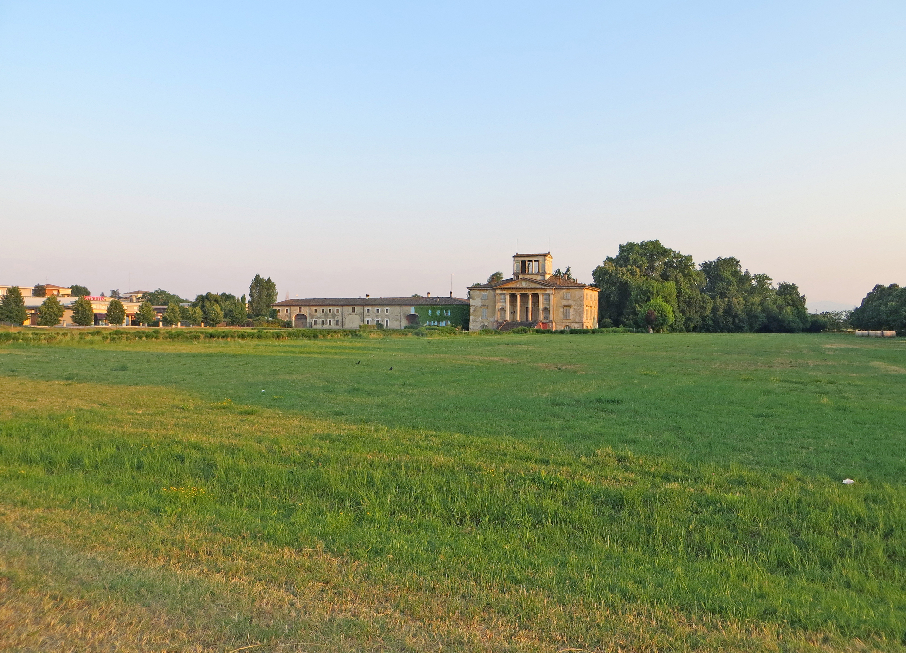 Villa Levi-Tedeschi (Parma) - parco a nord